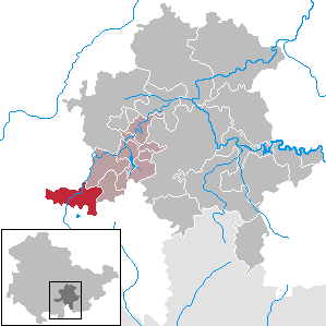 Katzhütte in Thuringia - District Saalfeld-Rudolstadt